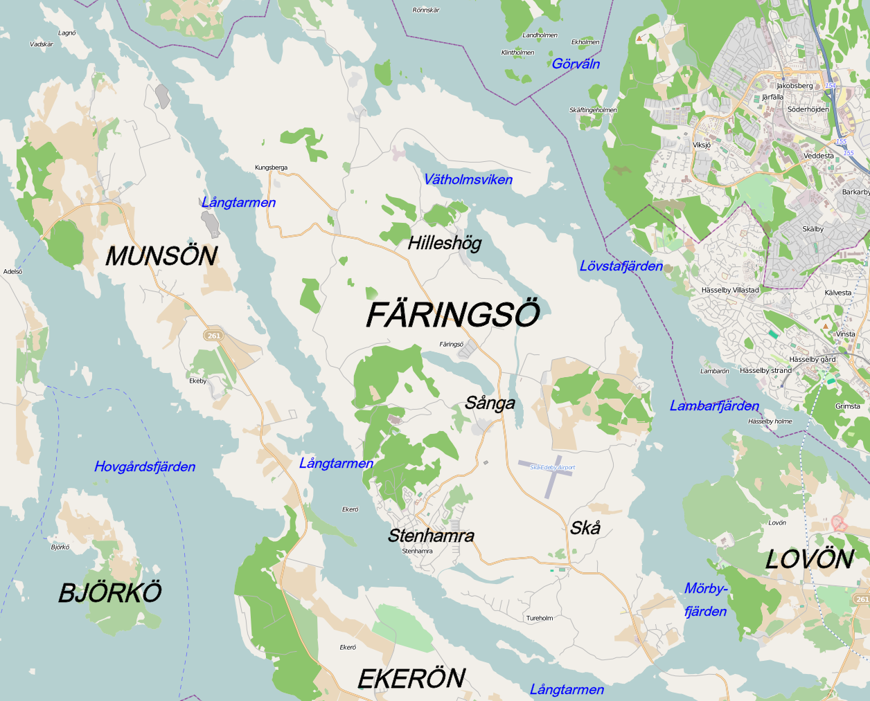 Mälaröar: Munsön, Färingsö och Ekerön This map may be incomplete, and may contain errors. Don't rely solely on it for navigation.